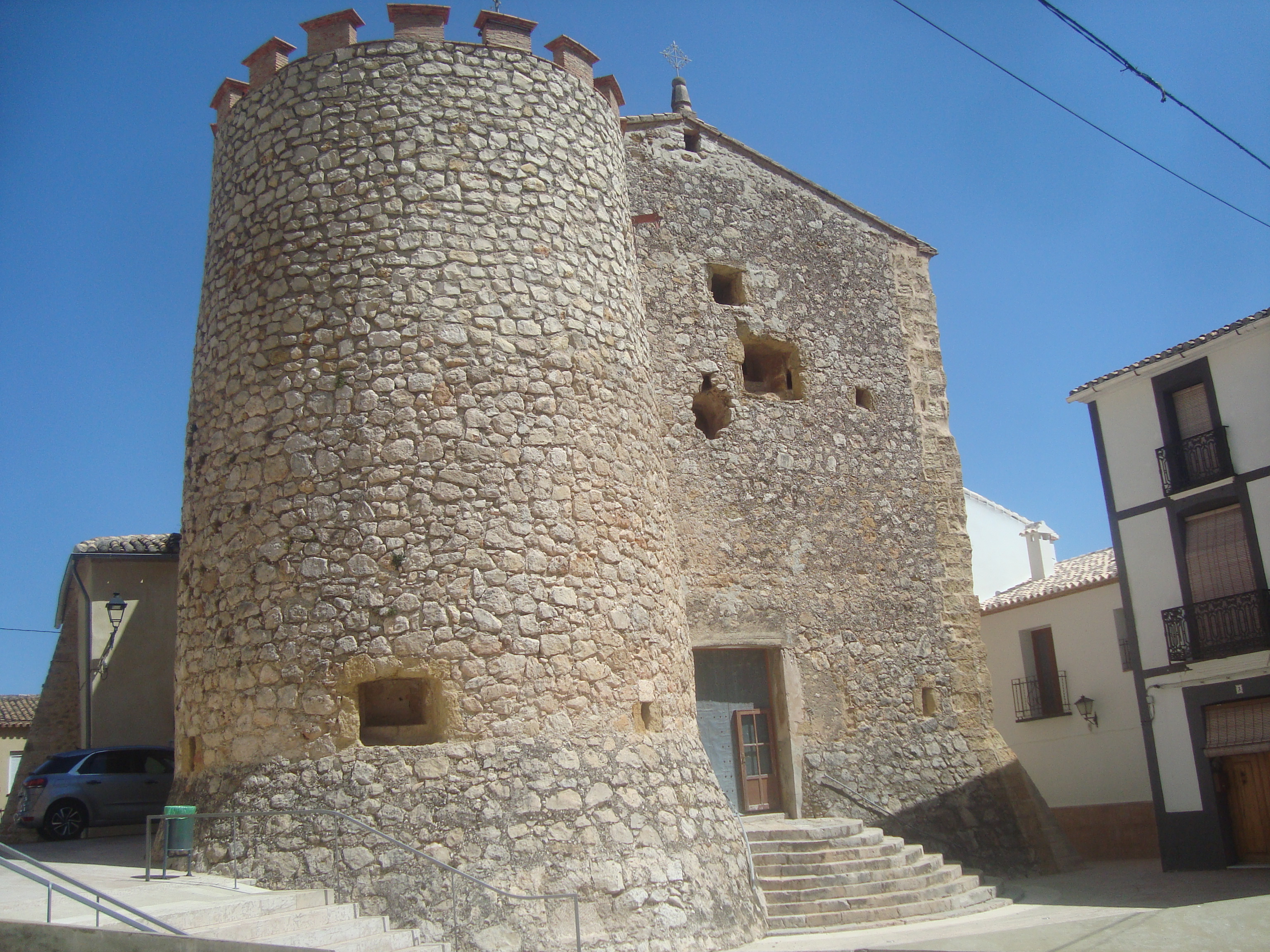 Castell-Església parroquial de Sant Miquel Arcàngel (Murla)